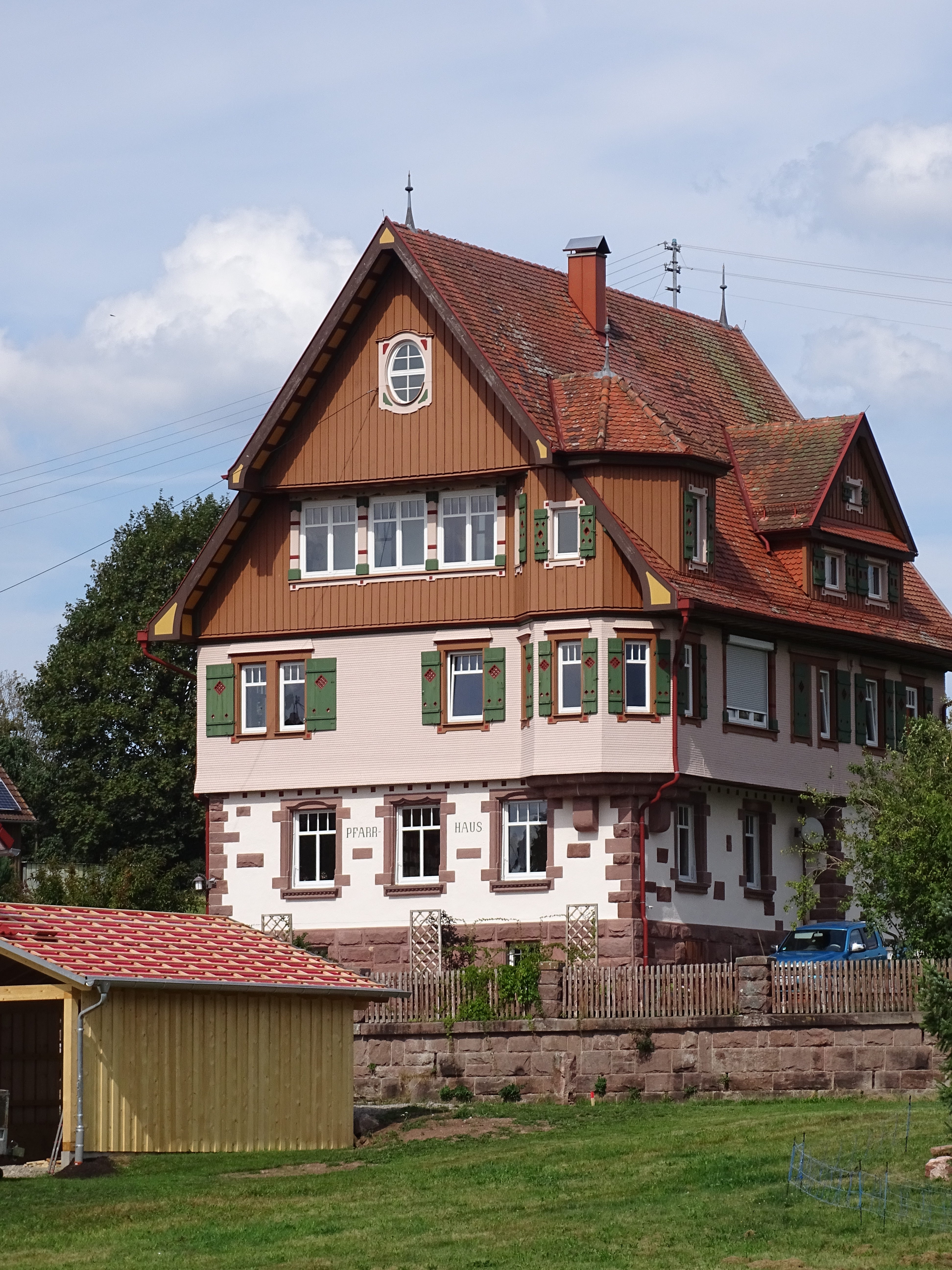 Pfarrhaus Würzbach